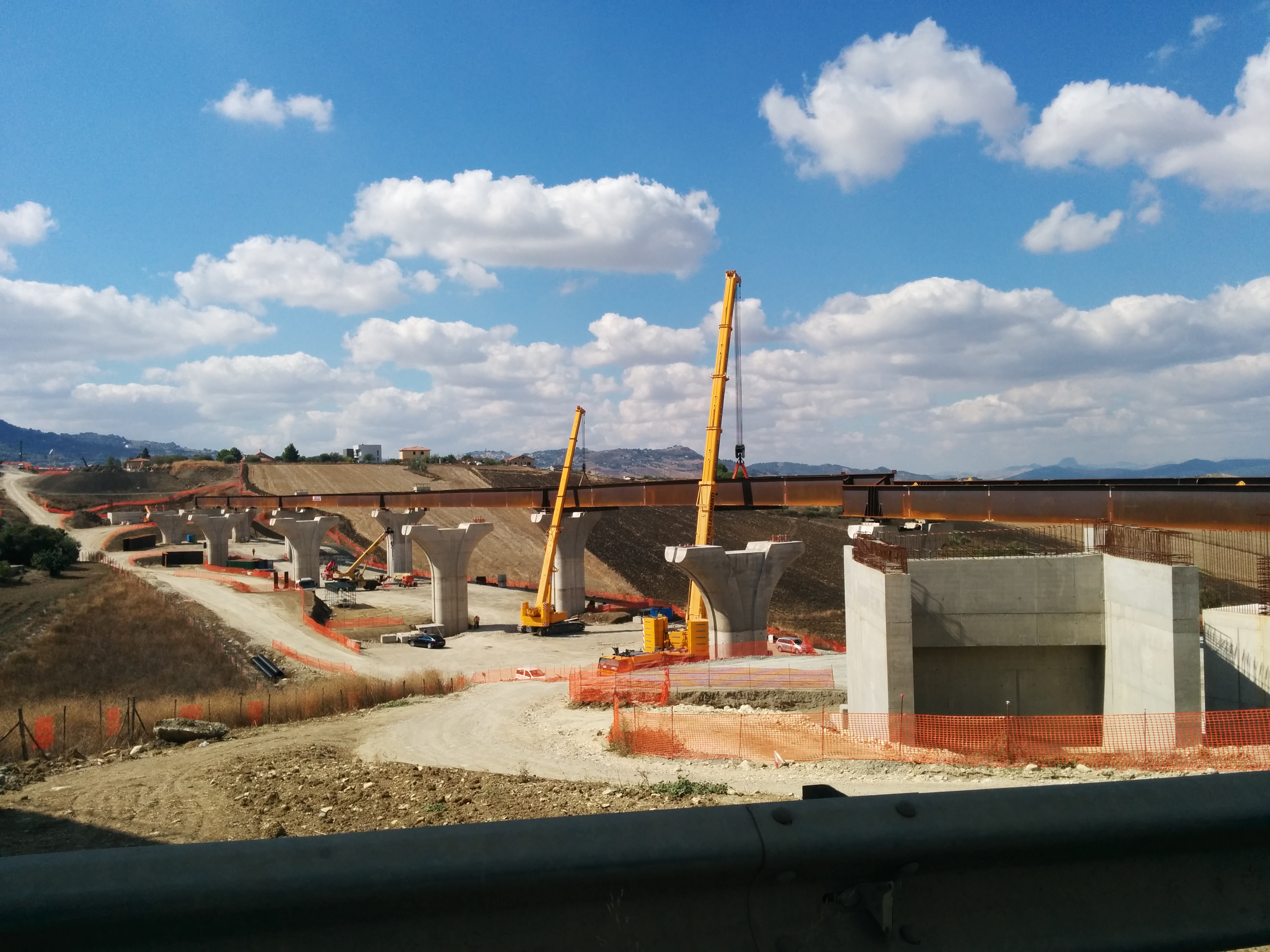 il viadotto Busita III sulla SS640 in costruzione